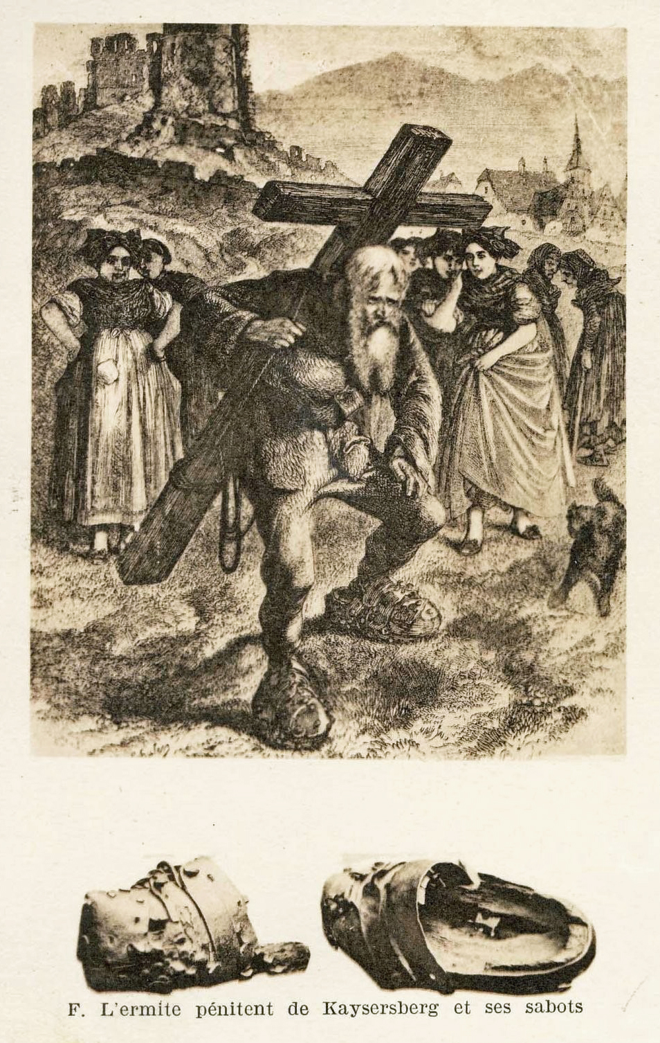 L'ermite pénitent de Kaysersberg et ses sabots